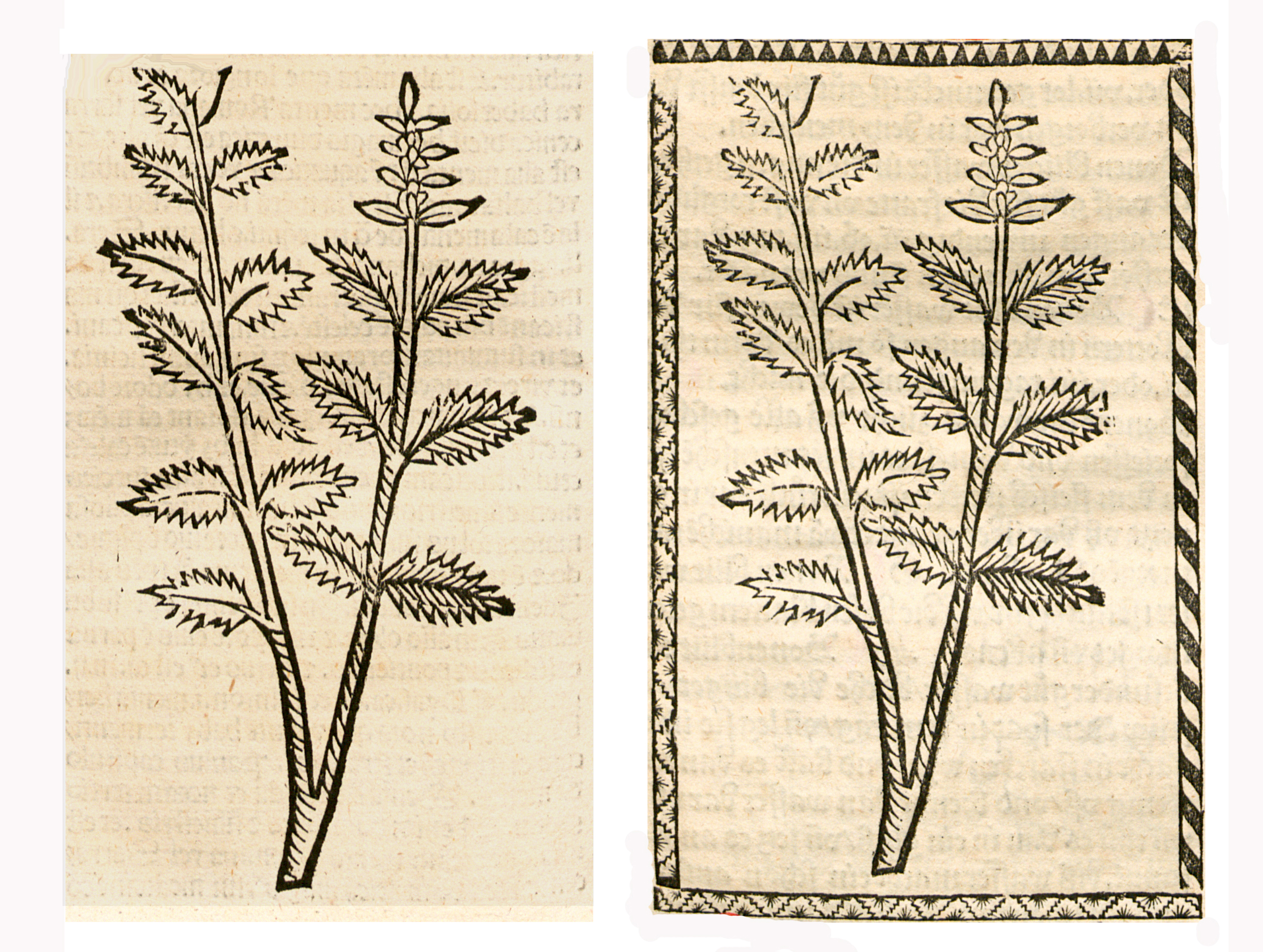 Abbildung von: Bachminze